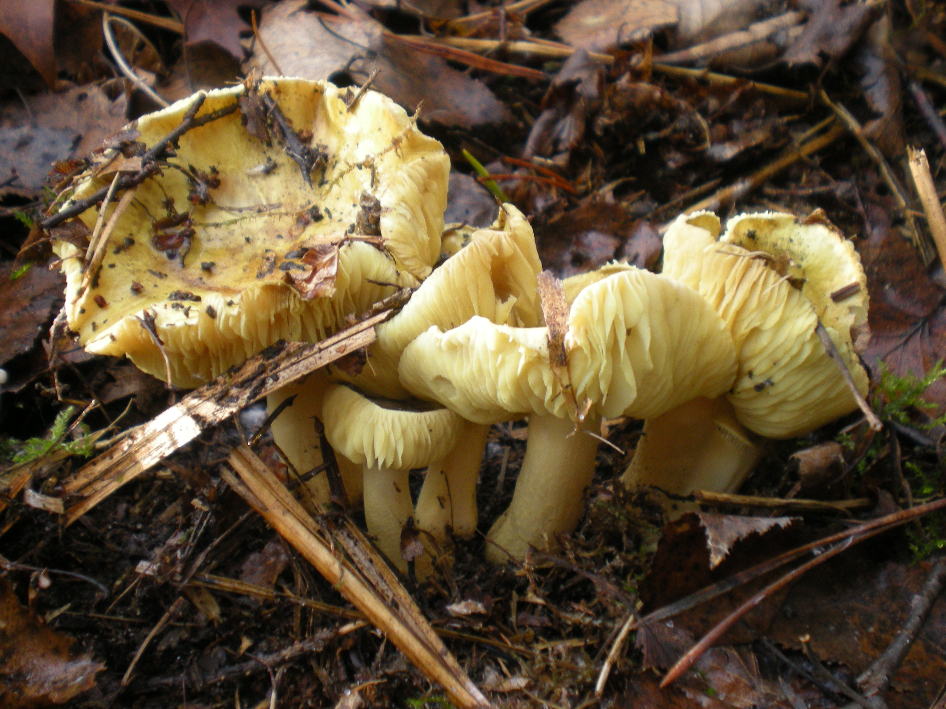 Gąska zielonka